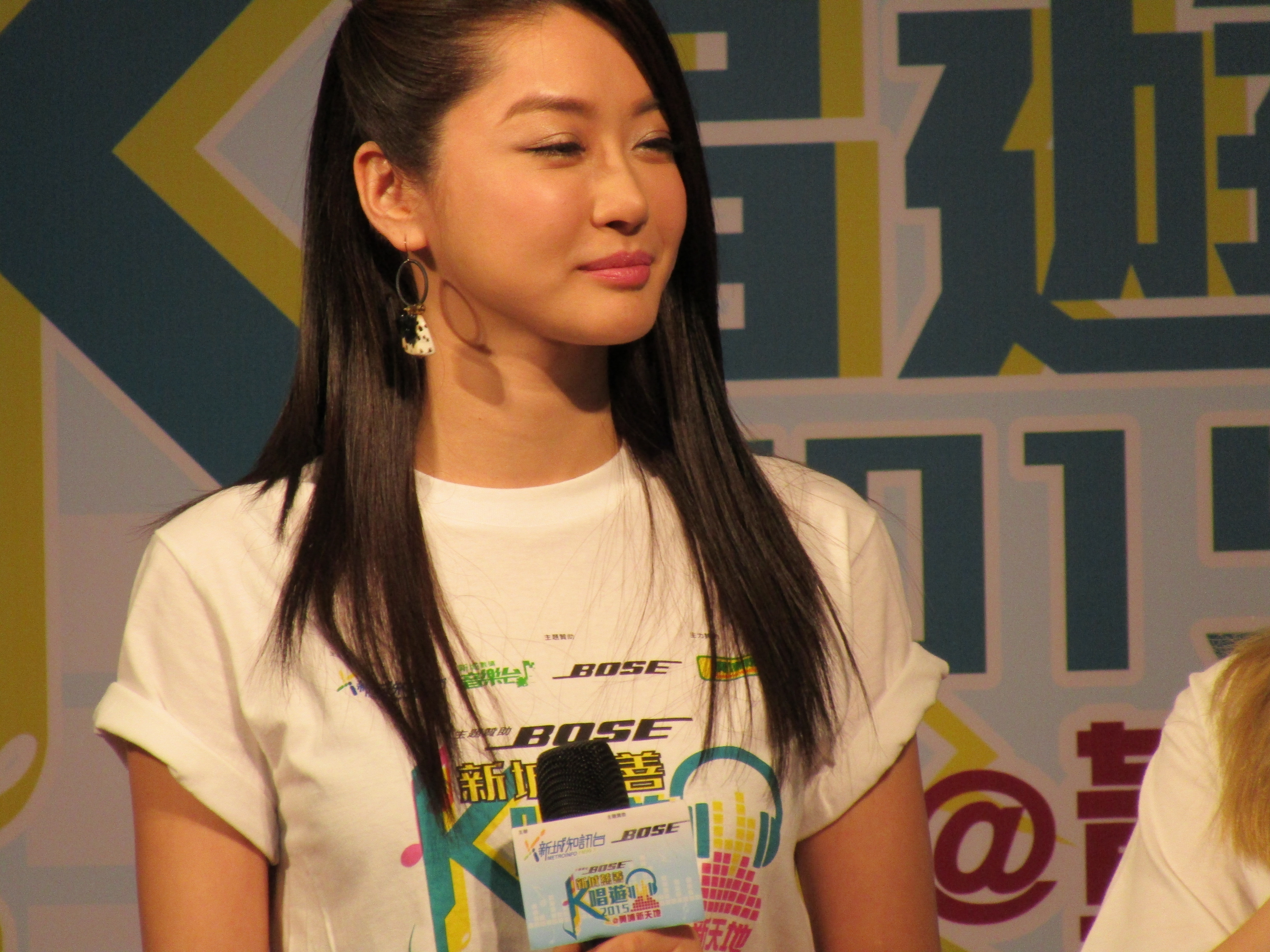 中文（香港）: 李河璘在紅磡黃埔新天地演出